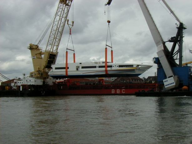 Schnellfähre „Speedy“ Information about Speedy may be found at IMO 9228409. A ship can change name and flag state through time, but the IMO number remains the same through the hull's entire lifetime. As a result, it can be useful to identify a ship by using the IMO number.